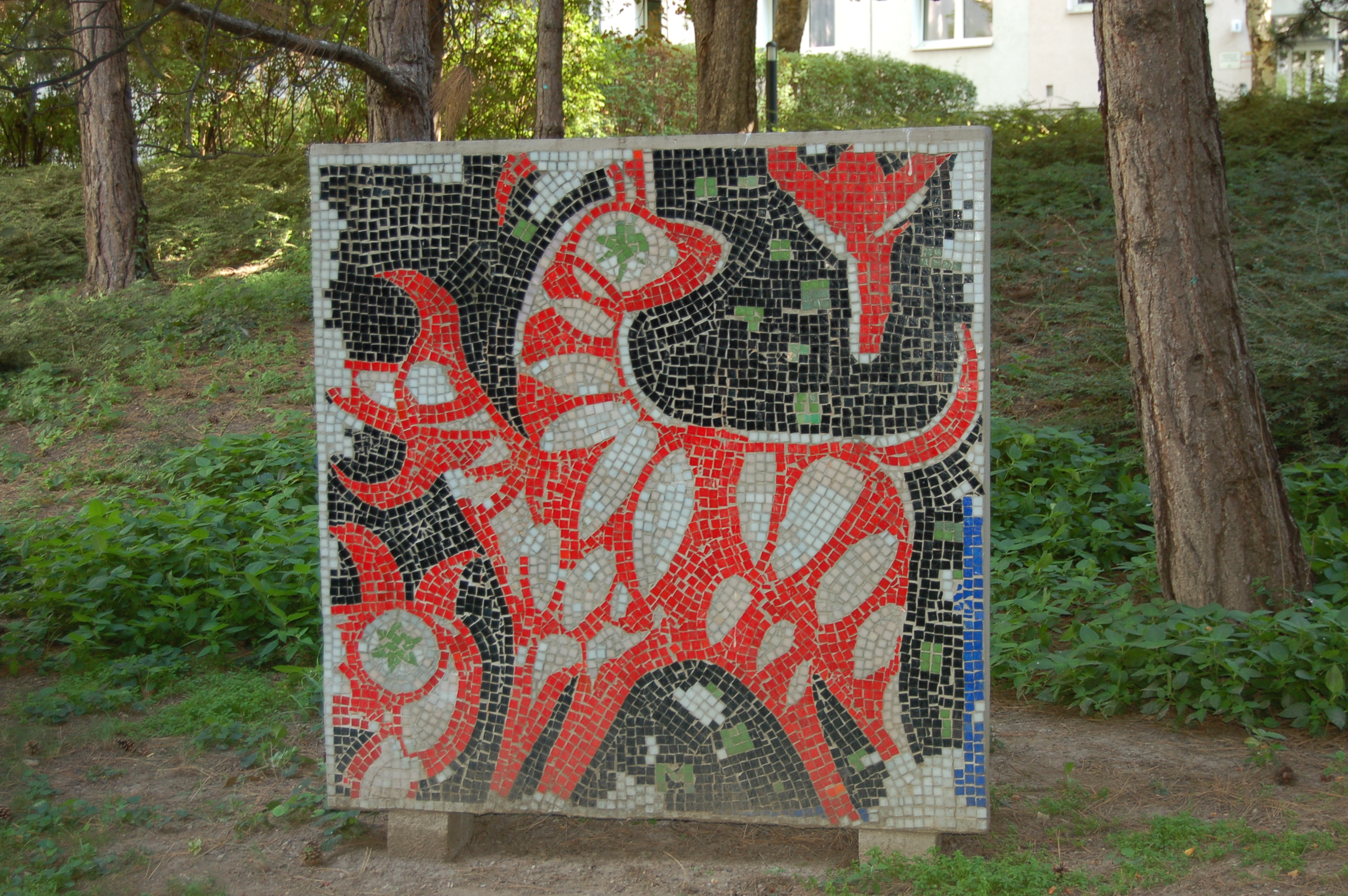 Das Mosaik im Karl-Honay-Hof (Wien-Ottakring) befindet sich an einer frei stehenden Betonwand im Innenhof des Gemeindebaus. Es wurde zwischen 1960 und 1967 von Maximilian Melcher geschaffen.